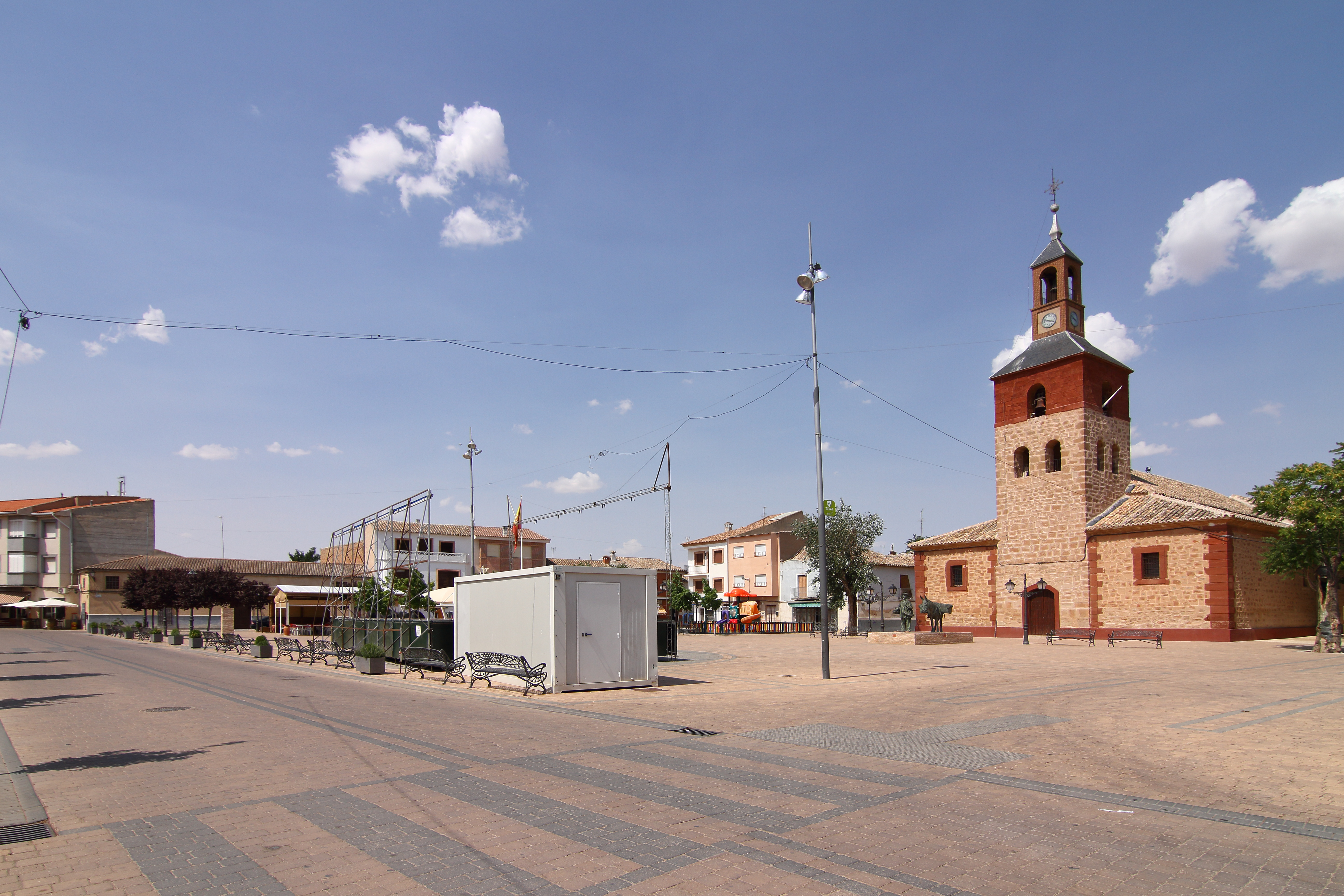 Villafranca de los Caballeros, Plaza de España